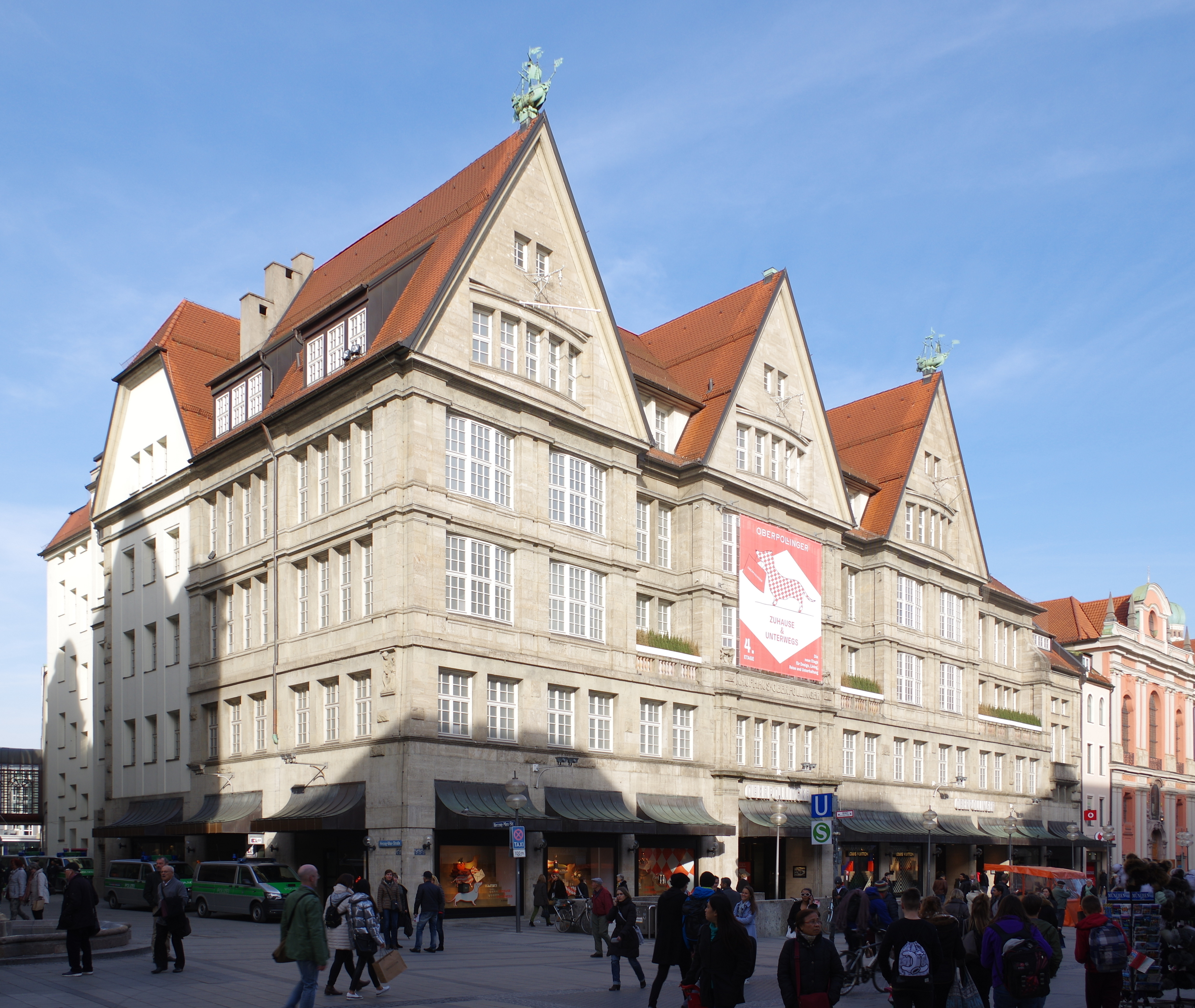 München, Neuhauser Straße 18, Kaufhaus Oberpollinger; Akten-Nr. D-1-62-000-4714